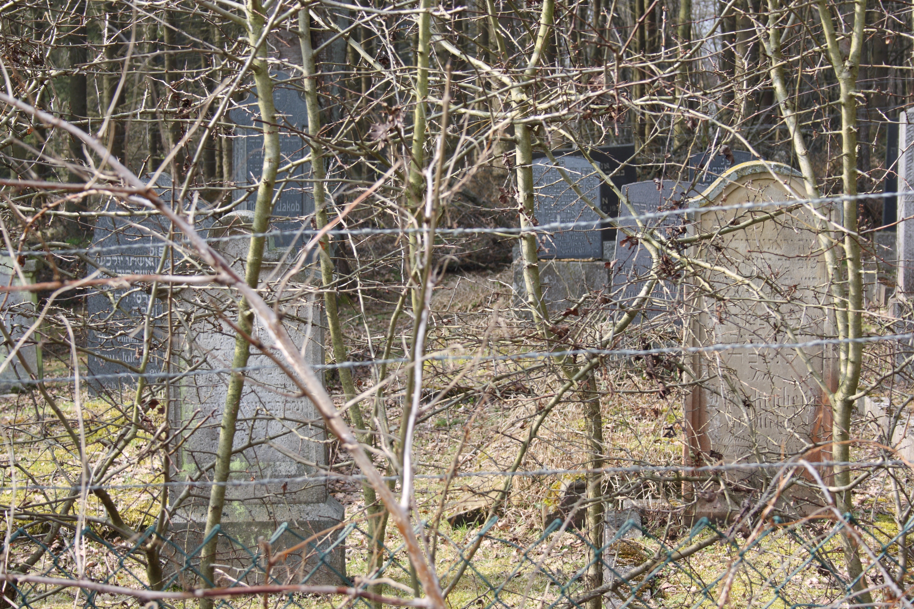 Ansicht des jüdischen Friedhofs in Puderbach